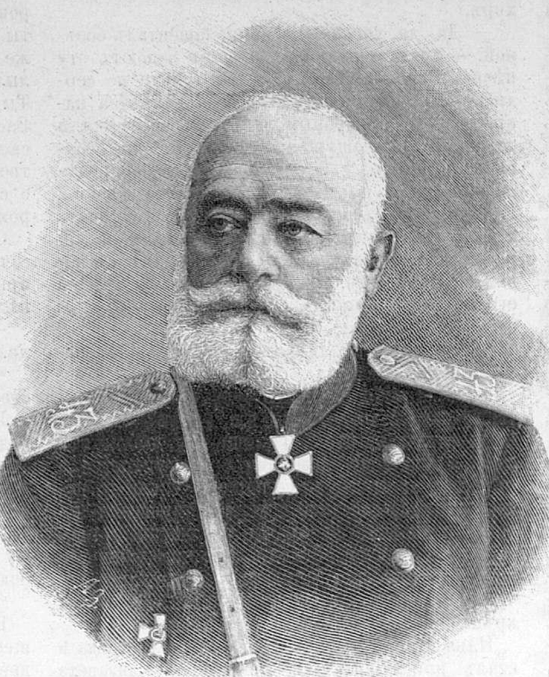 Чавчавадзе Захарий Гульбатович, 1880-е годы